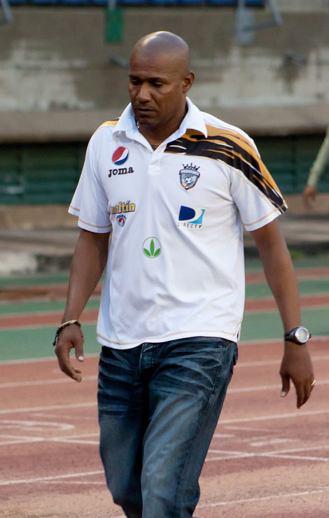 Noel Sanvicente en el partido Real Esppor Club vs Trujillanos FC